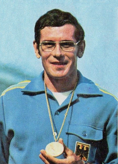 CAMPIONI dello SPORT 1973/74-Figurina n.25- KANNENBERG-GER.OVEST-ATL.LEGGERA-Rec